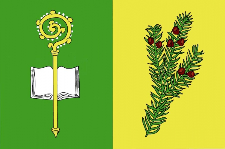 vlajka, Tisová, okres Ústí nad Orlicí